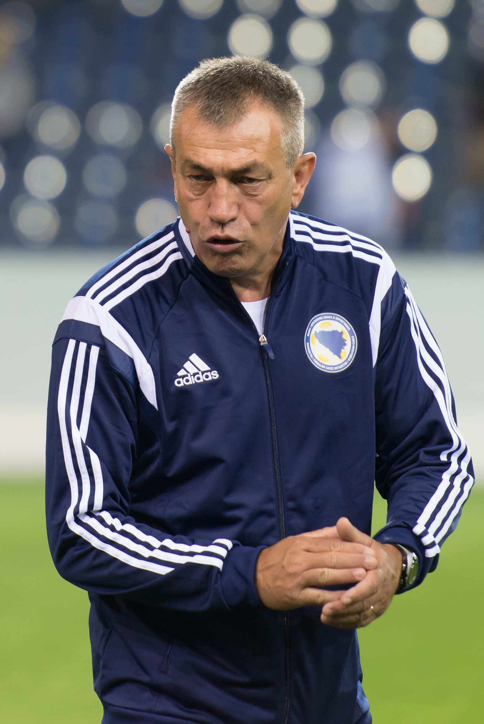 Fußball U21 EM-Qualifikation Österreich gegen Bosnien und Herzegowina St. Pölten, 5. September 2014 Vlado Jagodić